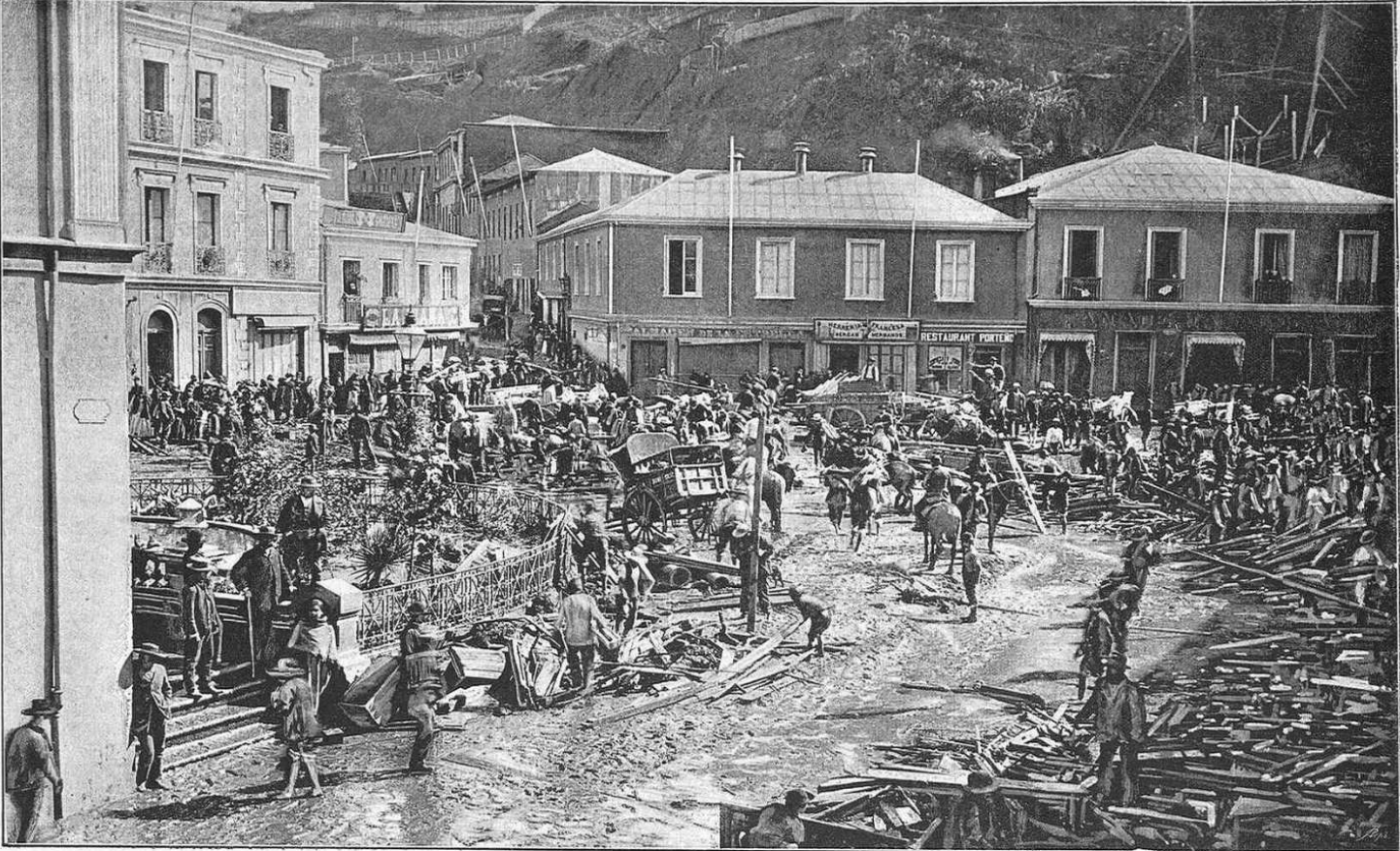 Valparaíso. Estado de la Plaza de Anibal Pinto, después de la inundación. (copia directa de fotografía). "Catástrofe del Tranque Mena."